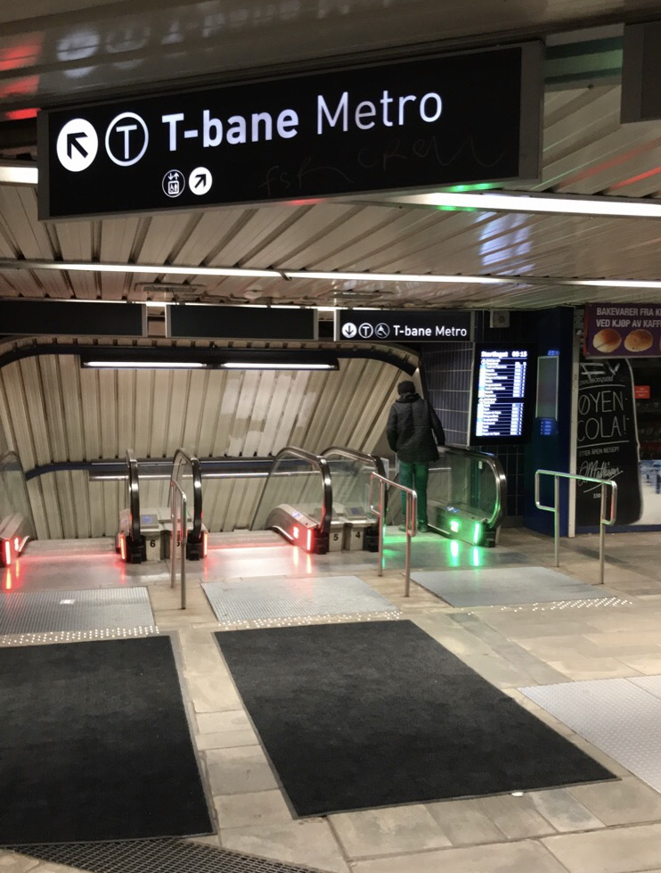 T-banen, Stortinget Station